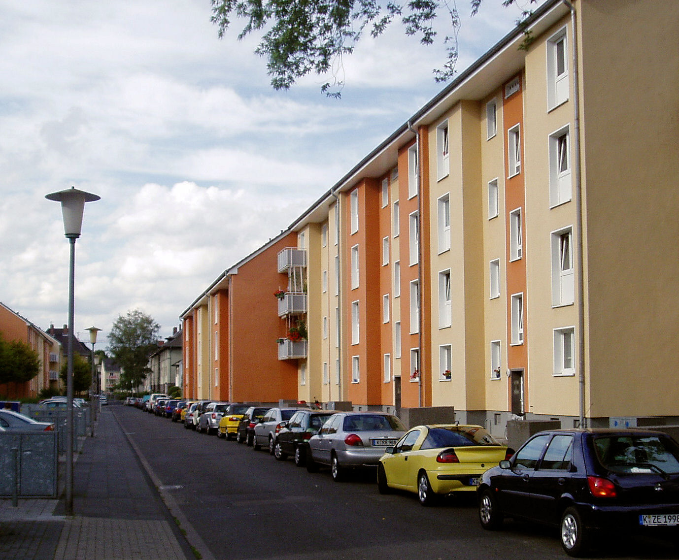 Sanierte Nachkriegsbauten in der Germaniasiedlung Köln-Höhenberg, Koburger Str.